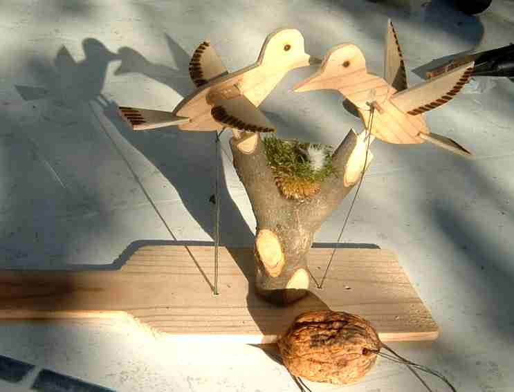 "La becquée". Jouet rustique. Création DD.